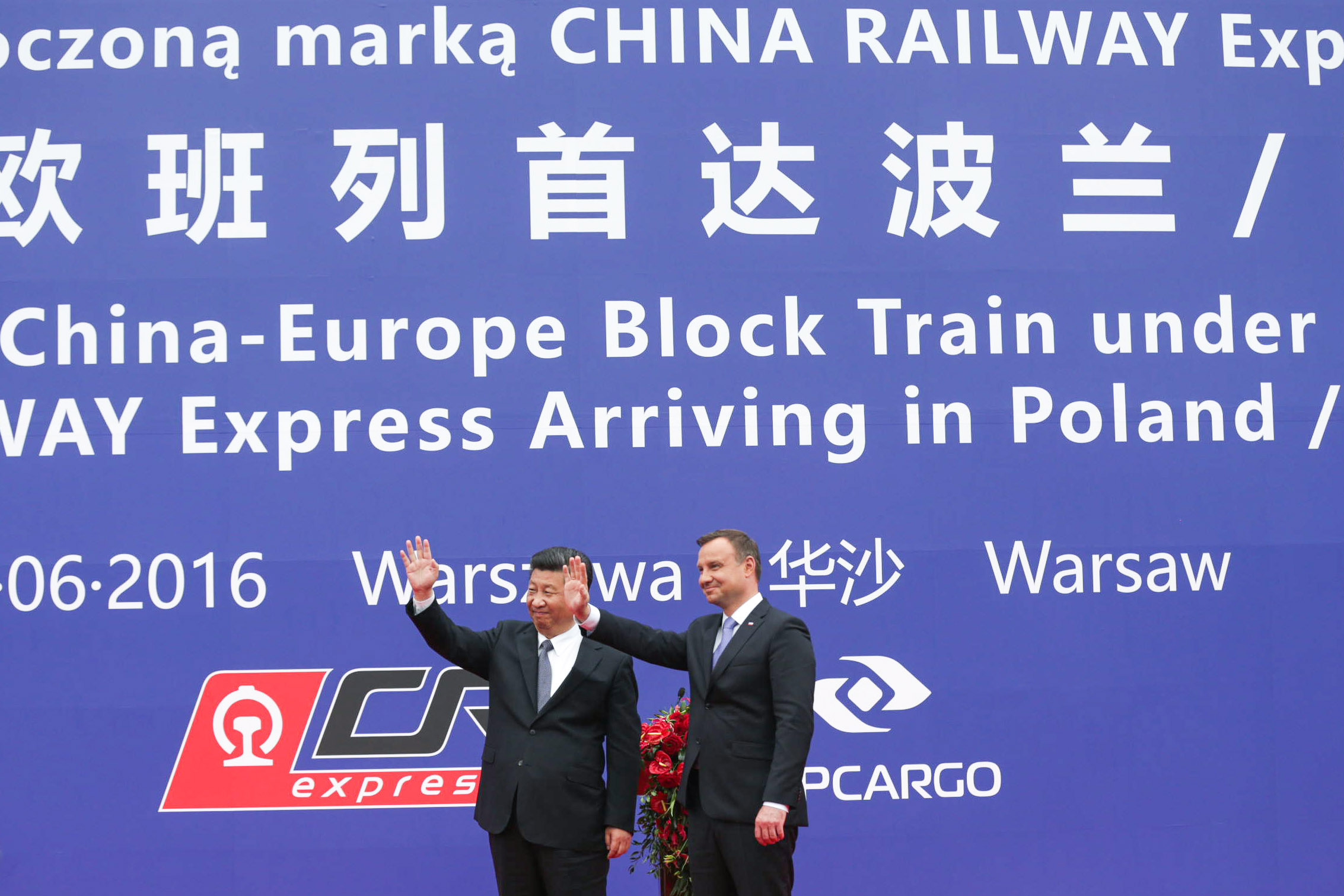 20/06/2016 Udział Prezydenta RP i Przewodniczącego ChRL w inauguracji połączenia kolejowego „China Railway Express”. Fot. Andrzej Hrechorowicz.